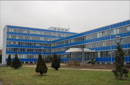 Budova Ústavu teorie informace a automatizace AV ČR, v.v.i., Pod vodárenskou věží 4, Praha 8